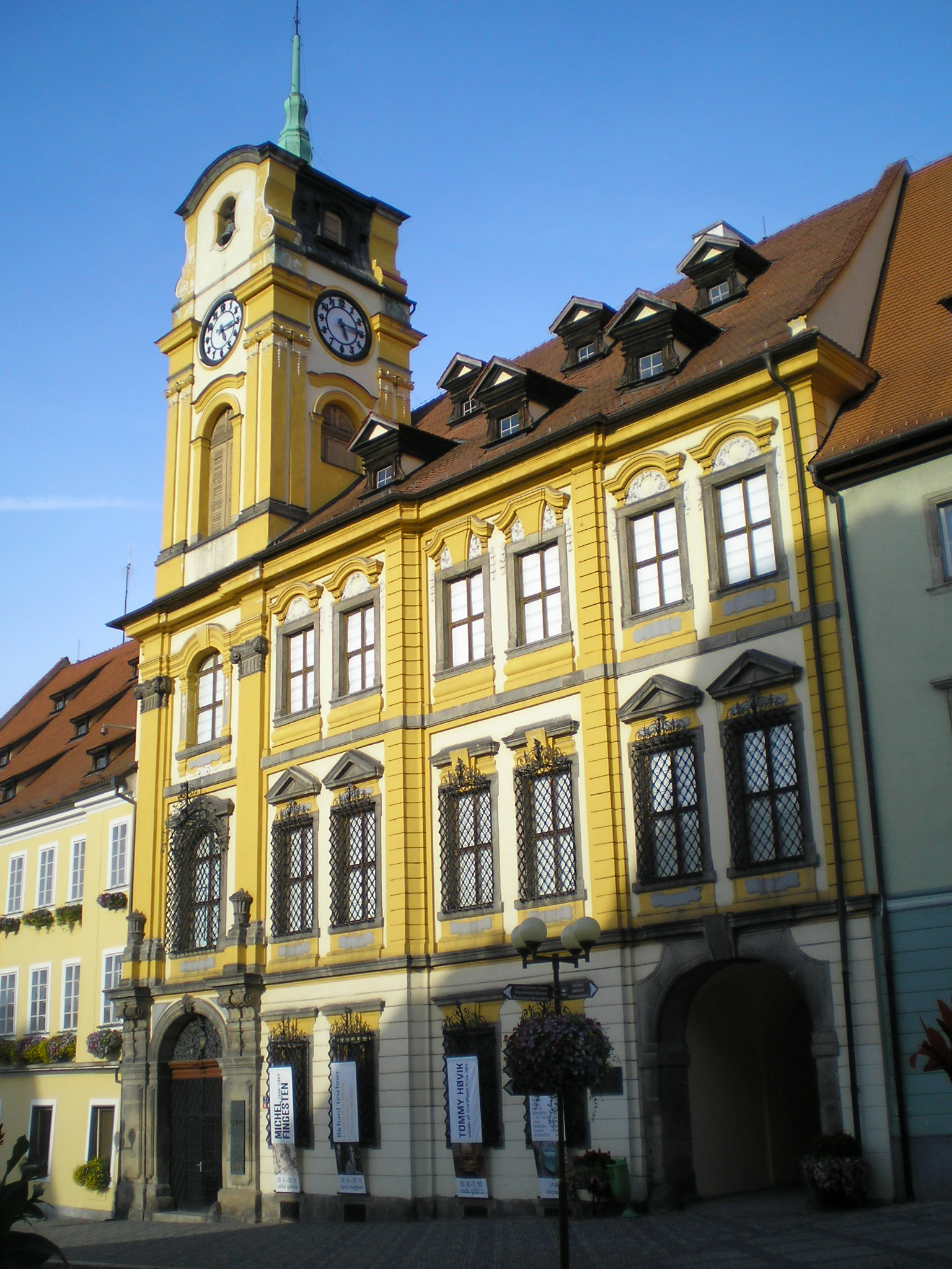 Radnice nová (Cheb), nám. Jiřího z Poděbrad 1, Cheb